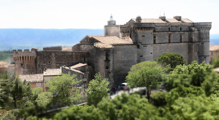 Le château de Gordes, France, vu du nord - castle in the village of Gordes, Vaucluse, France